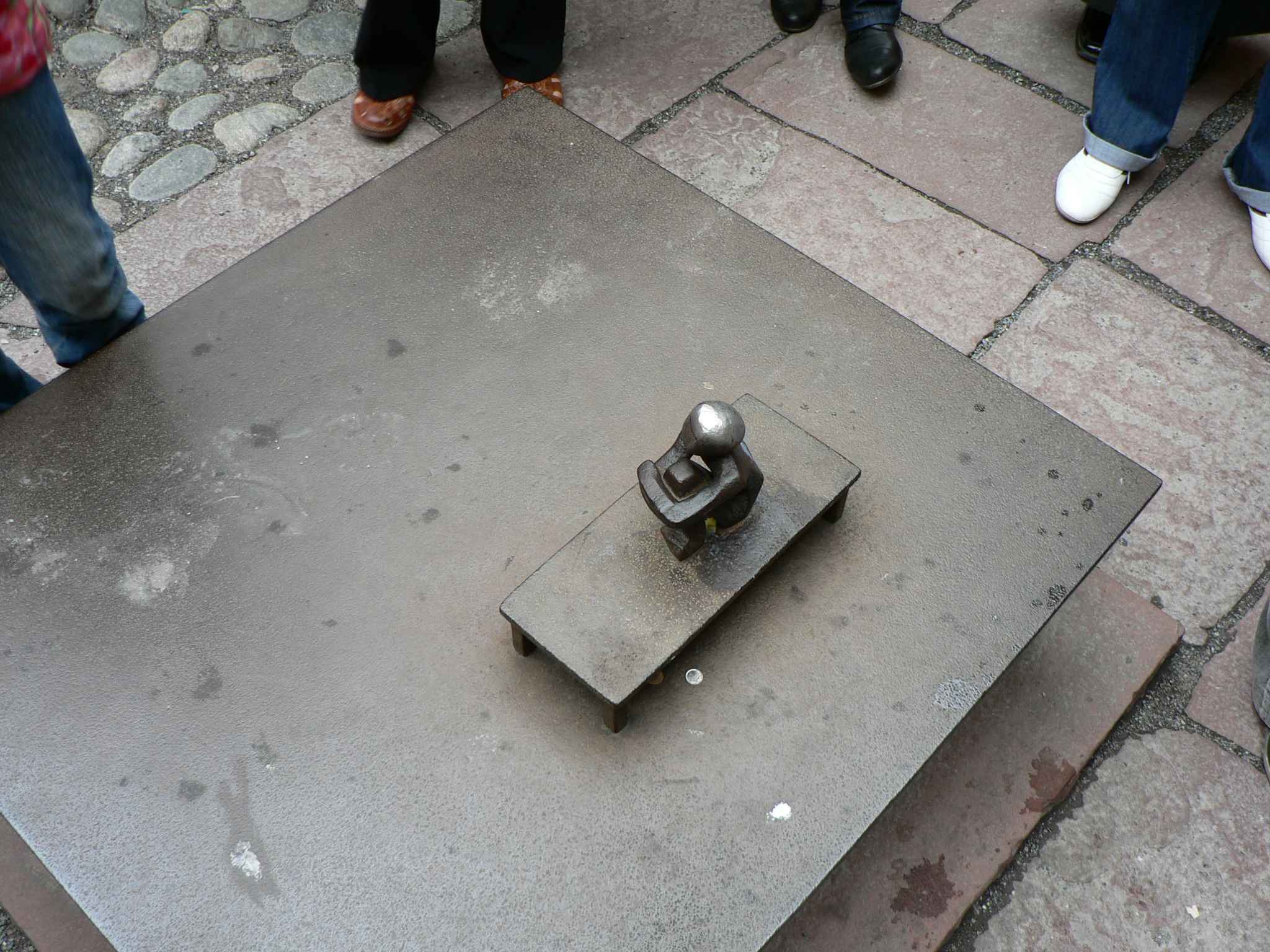 Мальчик, смотрящий на Луну/The boy, looking at the moon